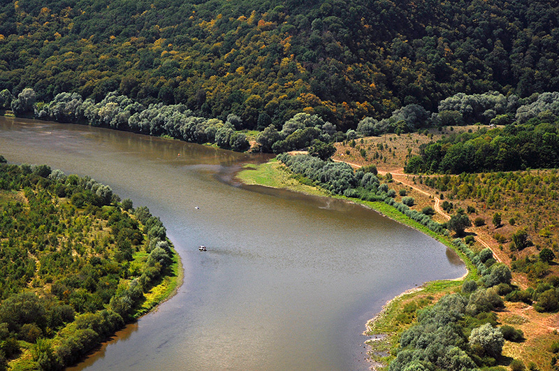 Місце впадіння (устя, гирло) Стрипи в Дністер.